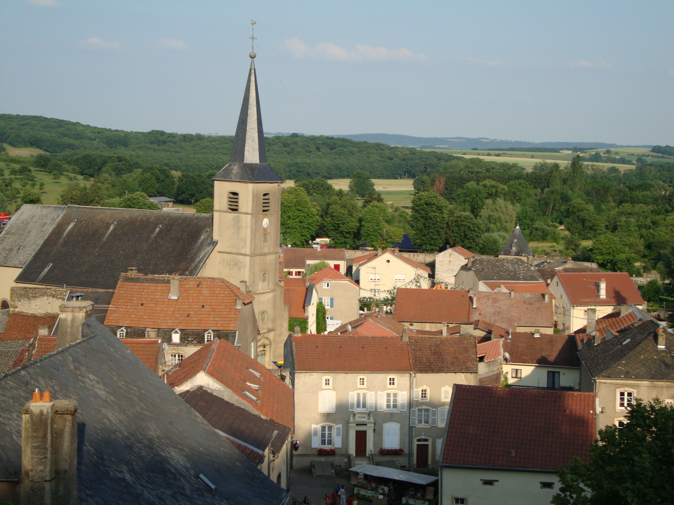 Rodemack